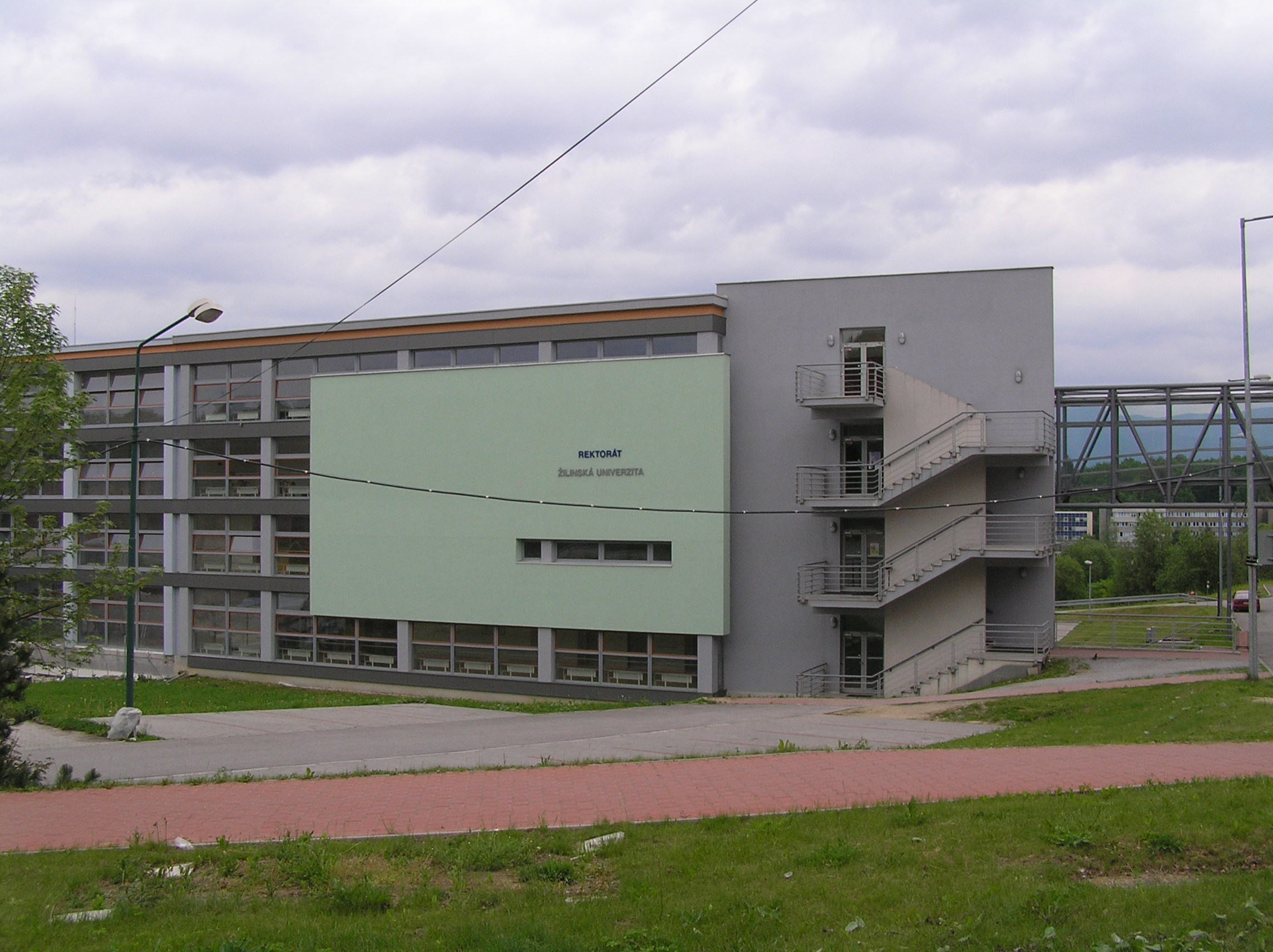 Žilina, pohľad z Veľkého dielu: Žilinská univerzita, nová budova rektorátu